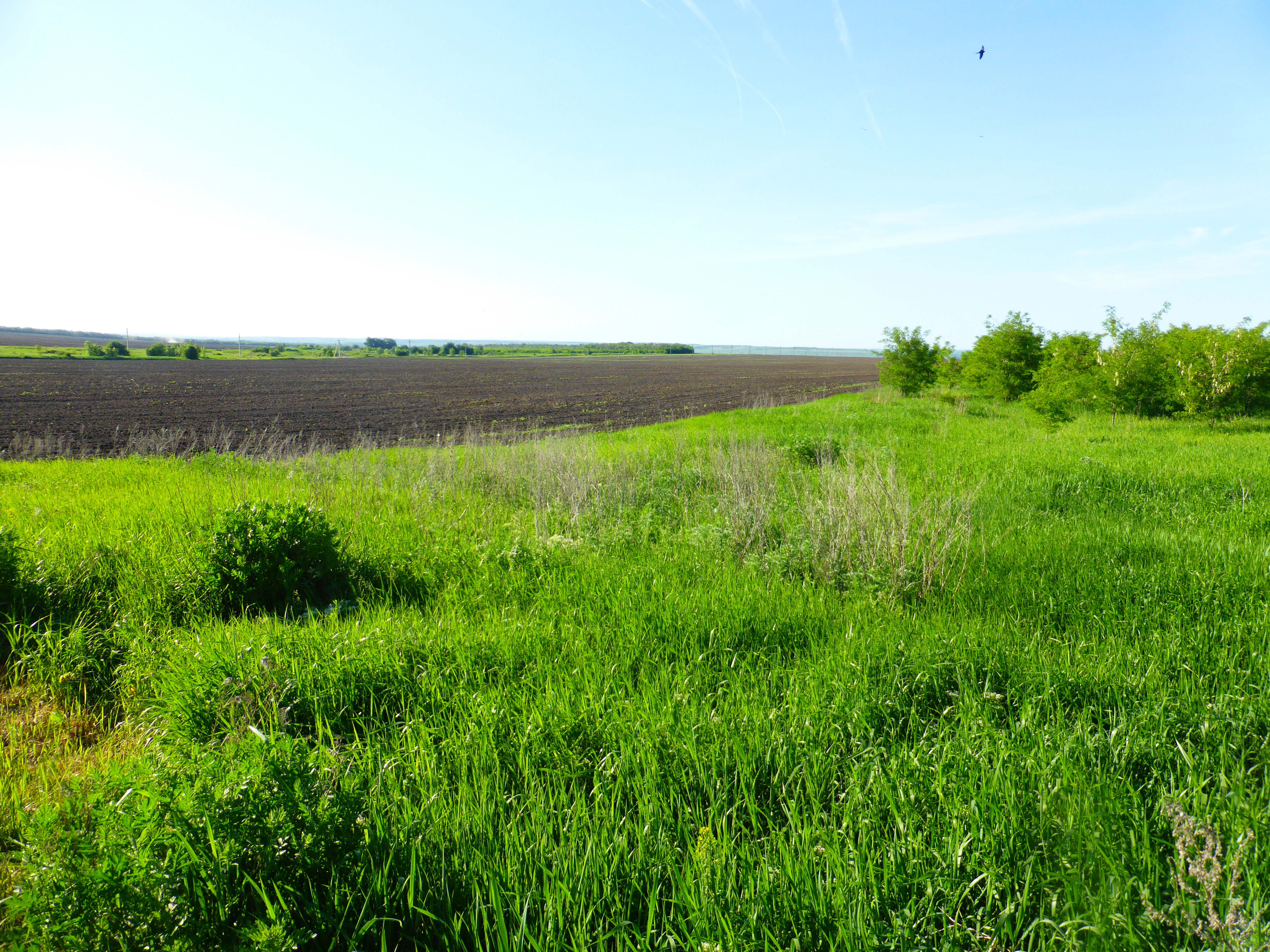 Фоминская дача: Фоминская дача расположена западнее х. Фоминка, Миллеровский район, Ростовская область This image is related to the protected area of Russia number 6110069